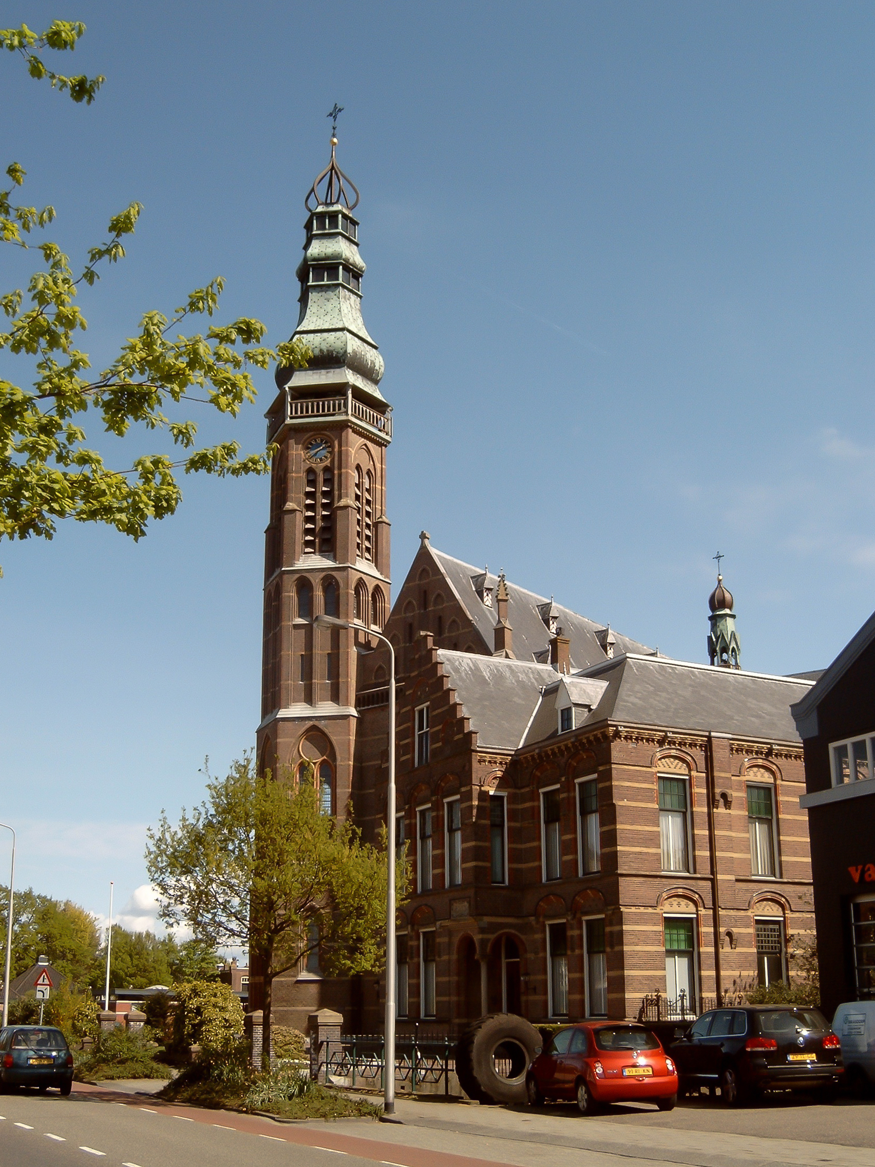 Kerk, Heereweg te Lisse, Zuid-Holland